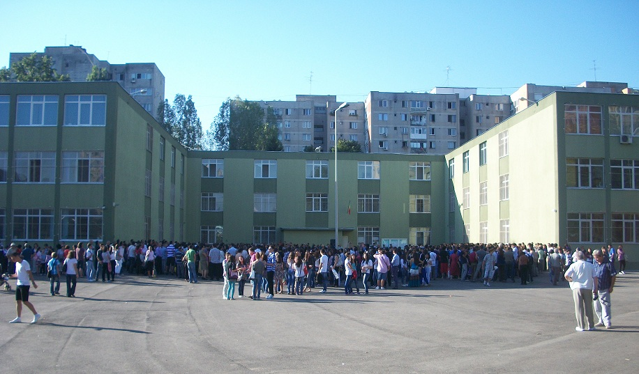 Festivitatea de deschidere a noului an școlar la Colegiul National „Eugen Lovinescu”